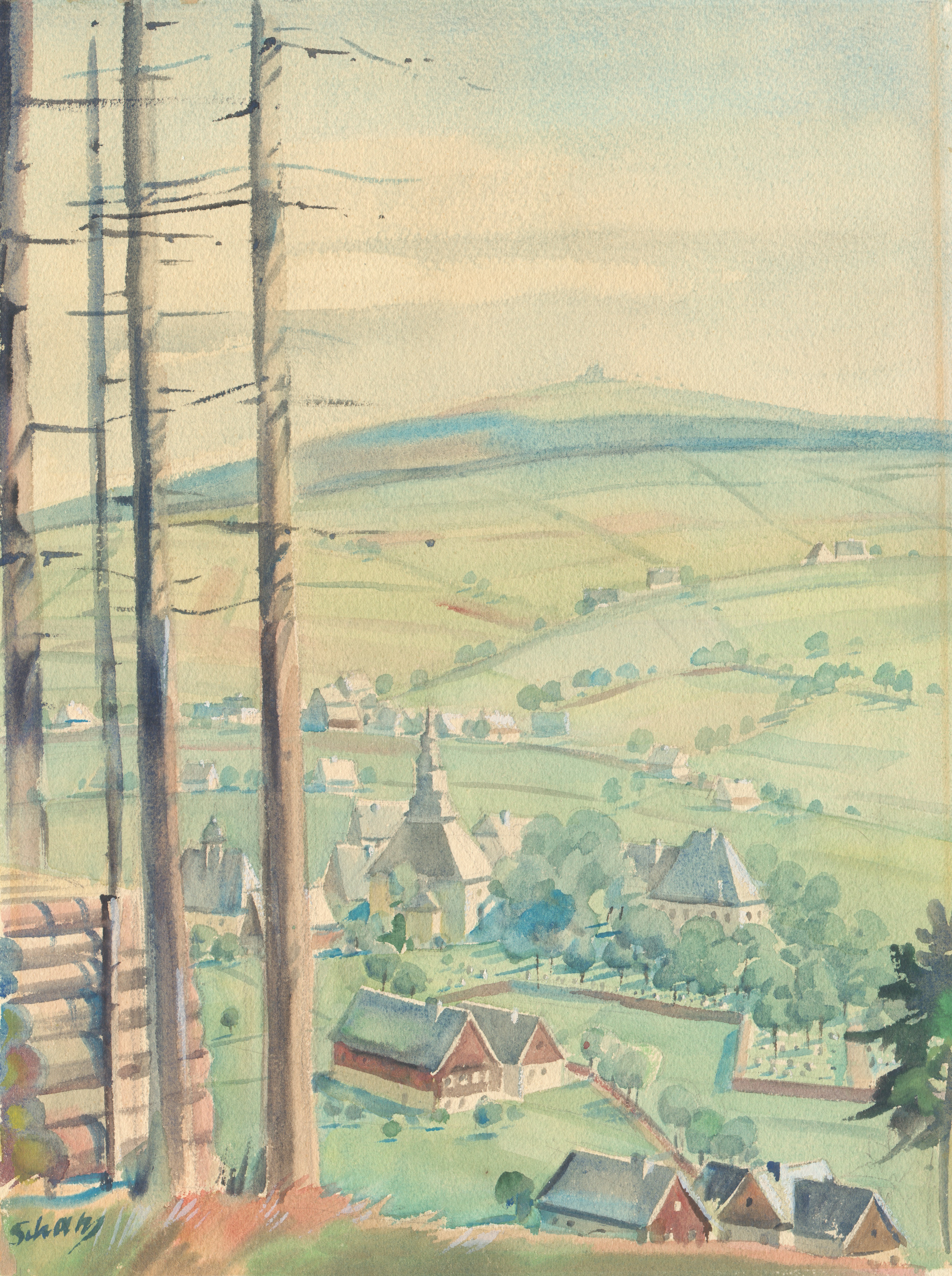 Seiffen (Deutschland) Seiffen vom Reichelberg aus